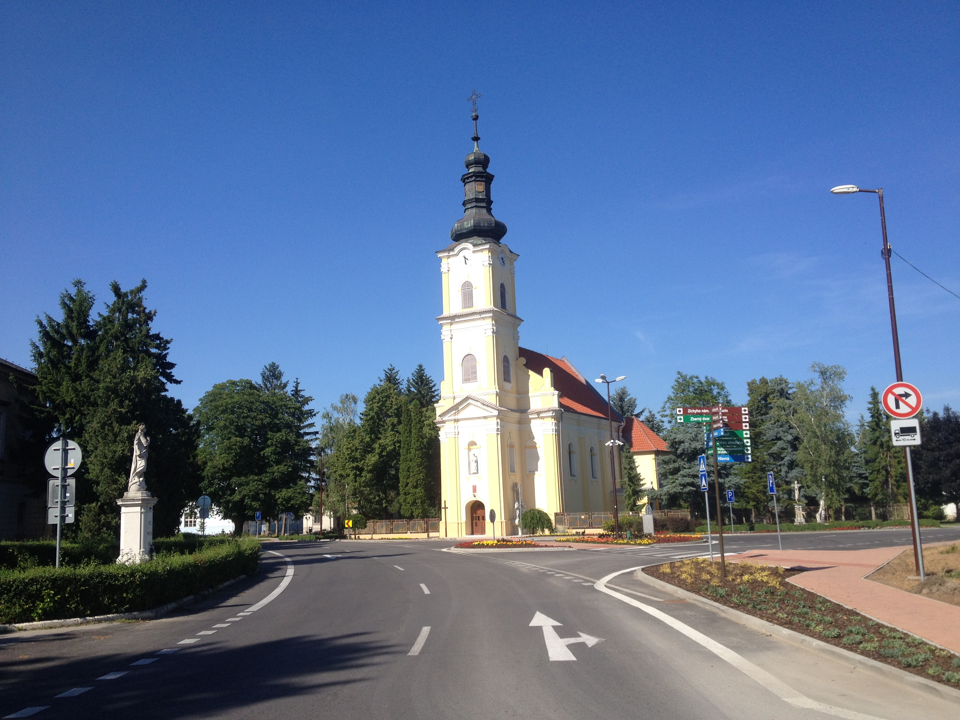 919 42 Voderady, Slovakia